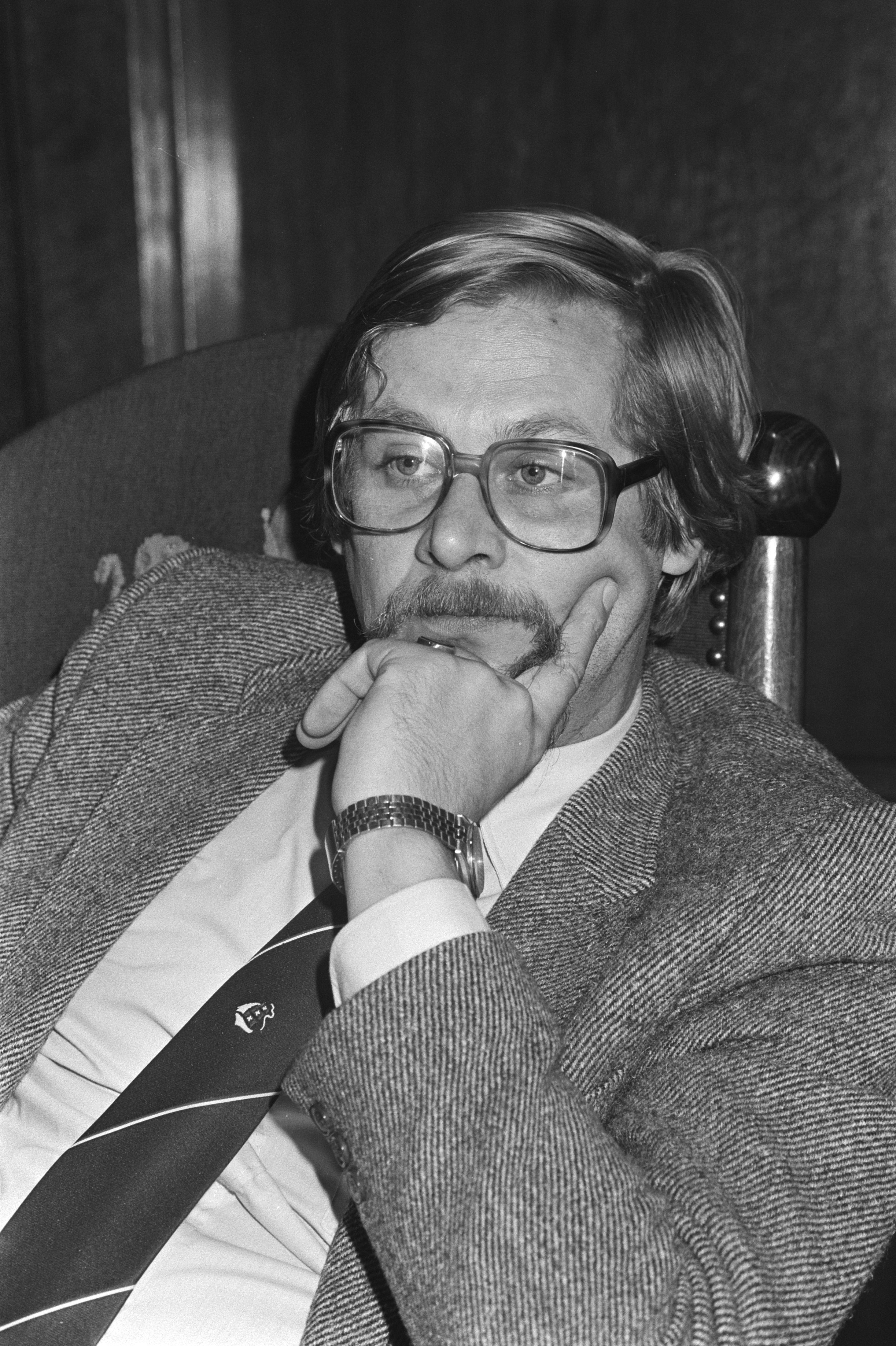 Collectie / Archief : Fotocollectie Anefo Reportage / Serie : Amsterdamse Gemeenteraadsvergadering Beschrijving : Wethouder Heerma (CDA) Datum : 21 oktober 1981 Locatie : Amsterdam, Noord-Holland Trefwoorden : politiek, portretten, wethouders Persoonsnaam : Heerma, Enneüs Fotograaf : Dijk, Hans van / Anefo Auteursrechthebbende : Nationaal Archief Materiaalsoort : Negatief (zwart/wit) Nummer archiefinventaris : bekijk toegang 2.24.01.05 Bestanddeelnummer : 931-7567